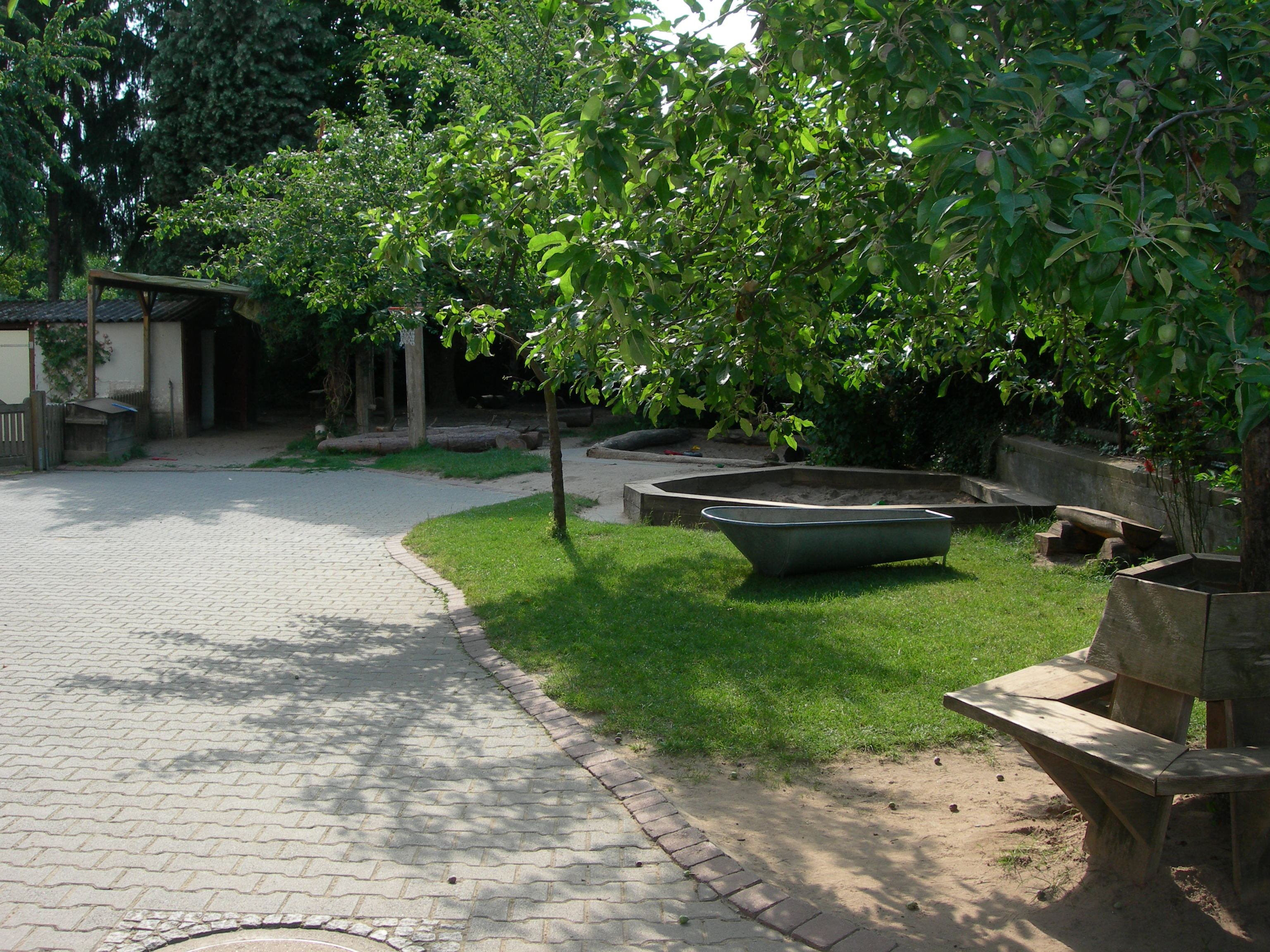 ekstera areo de la valdorfa infanĝardeno de Groß-Umstadt en Hesio (Germanio) Fonto: propra foto